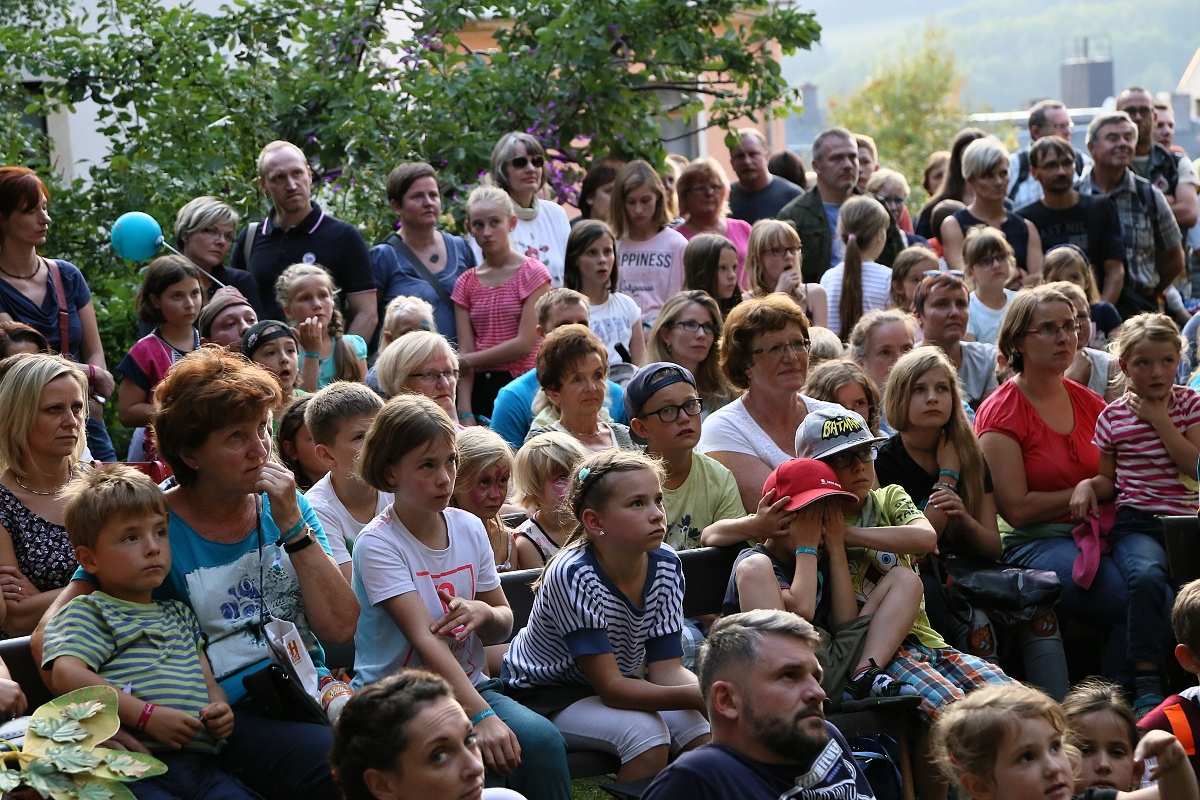 Filmfestival-Spielort Altstadtterassen